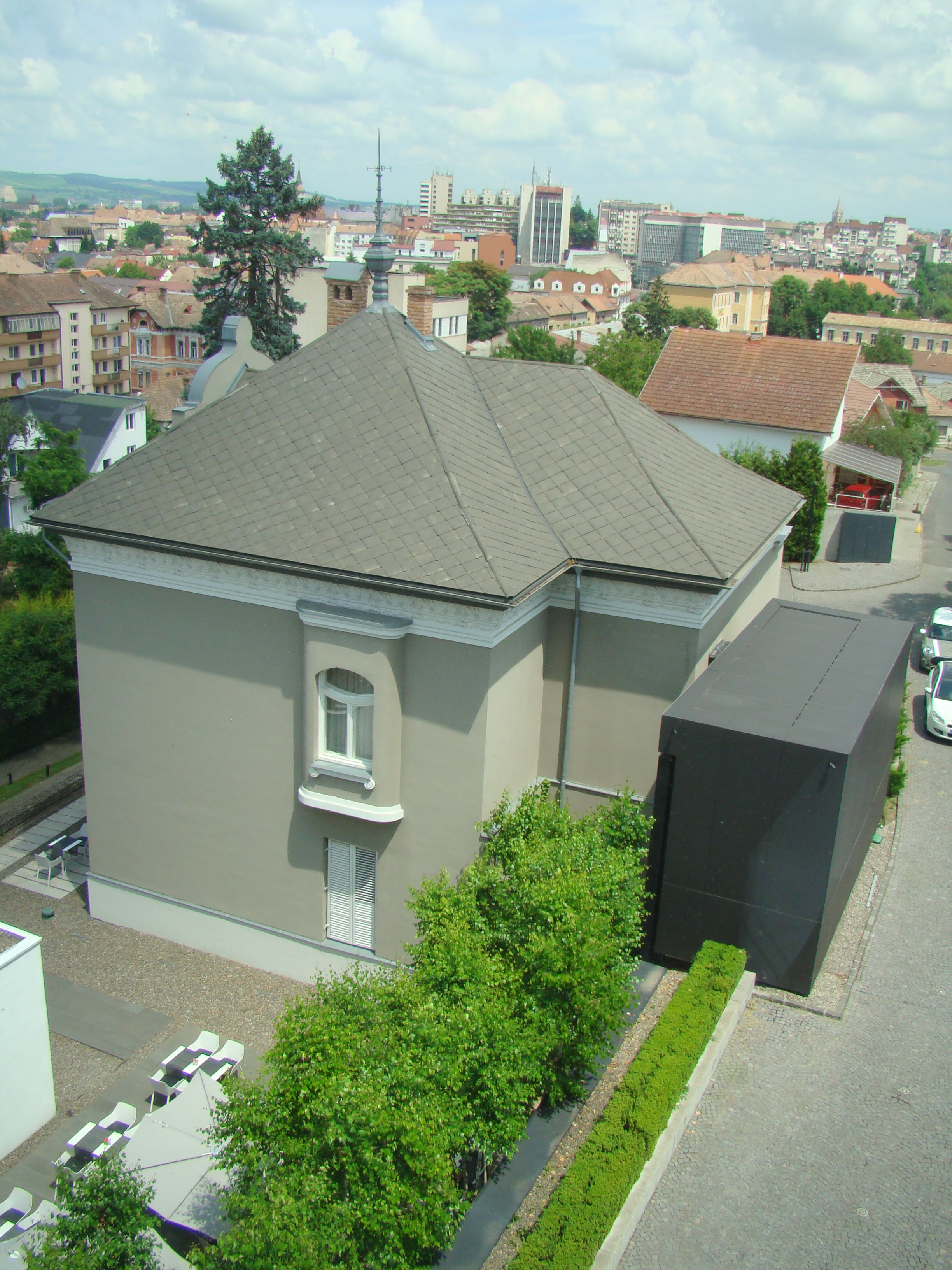 Casa Csonka, municipiul Târgu Mureș, str. Doja Gheorghe 35 1910